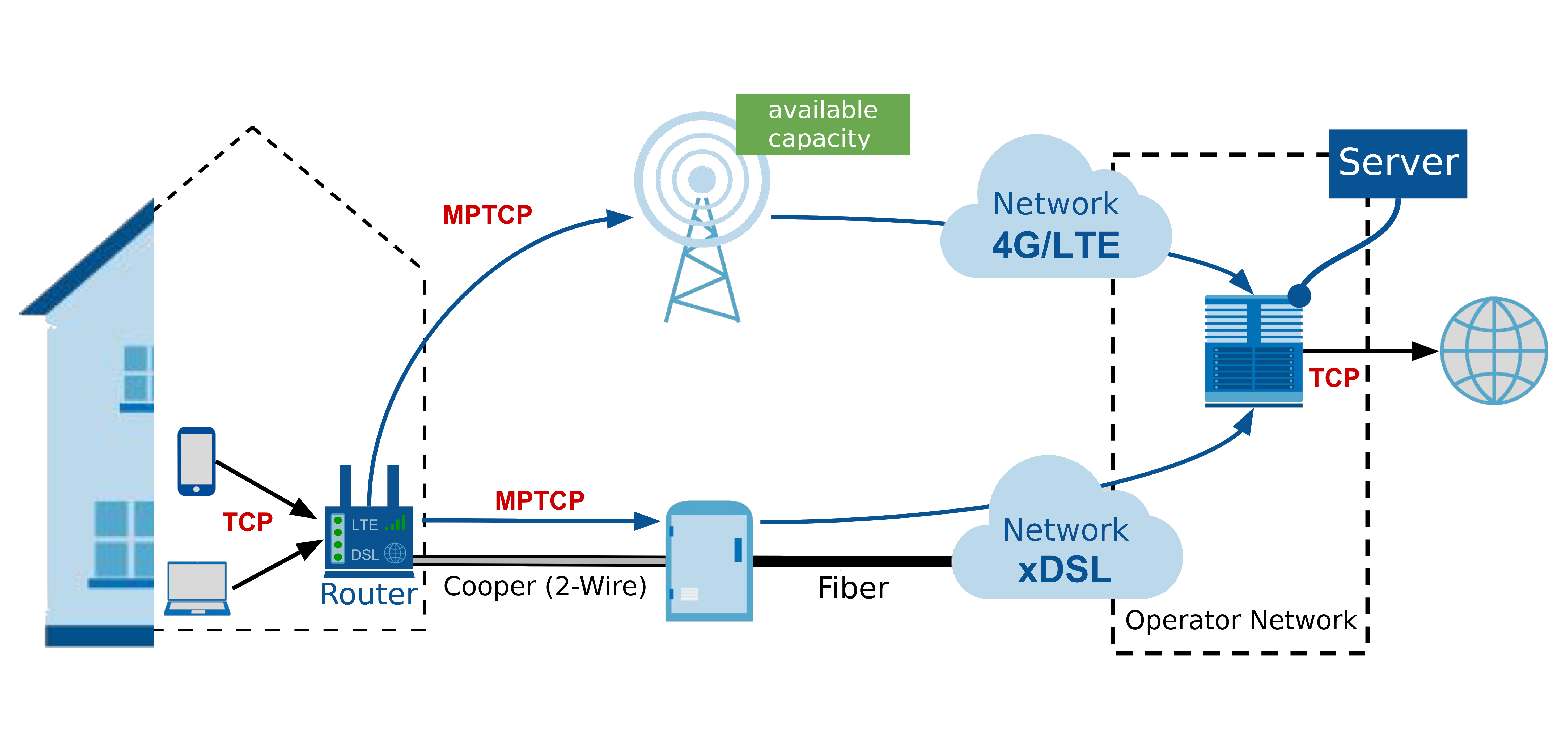 Description de l'architecture générale d'un réseau d'accès hybride utilisant Multipath TCP